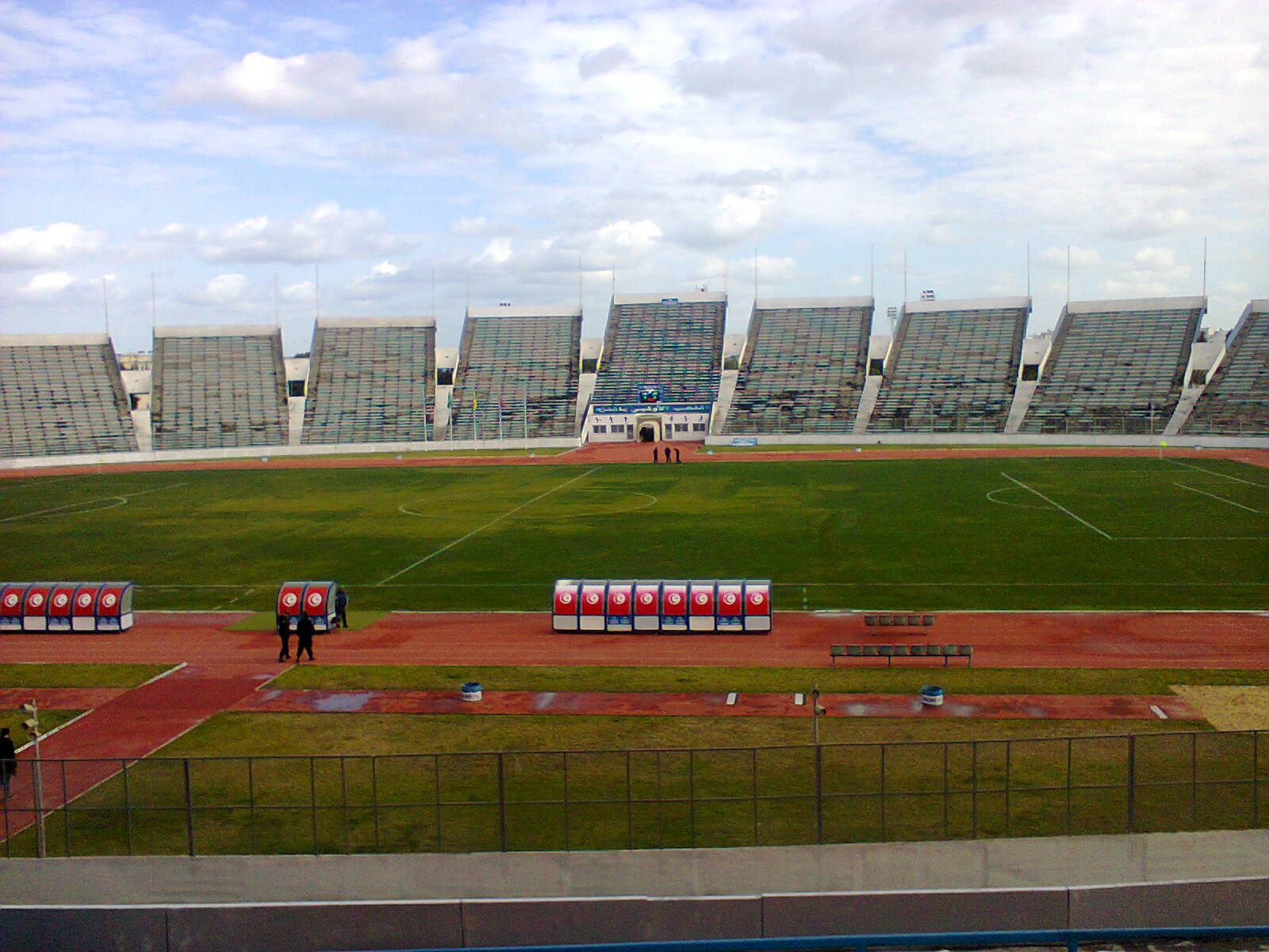 Vue de l'intérieur du stade